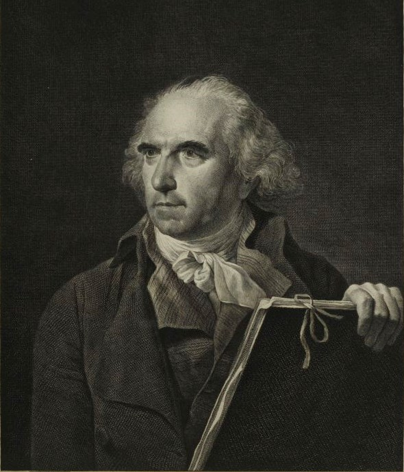 Estampe du peintre Hubert Robert, musée de la Révolution française, Vizille.